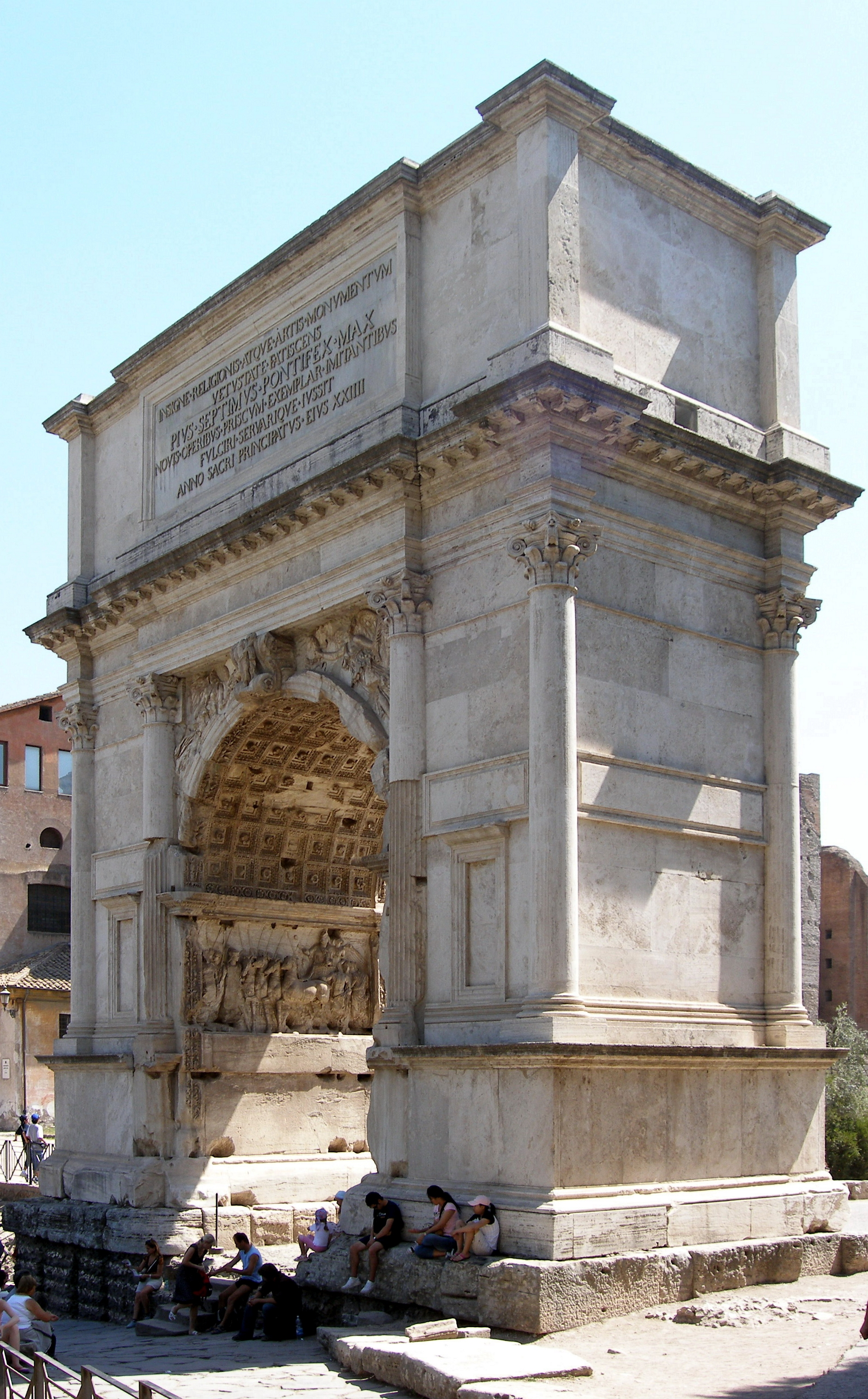 Rom, Titusbogen